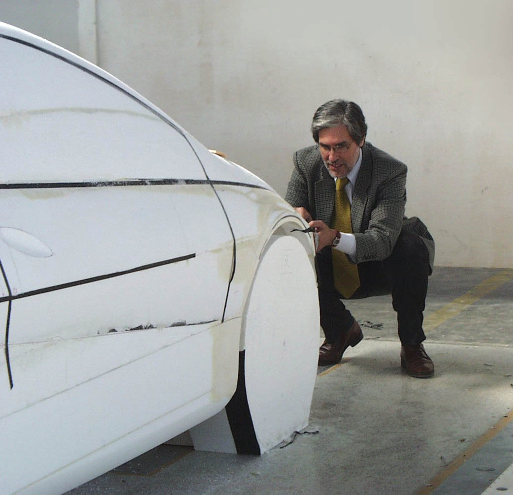 Al lavoro su un protoripo in scala 1:1